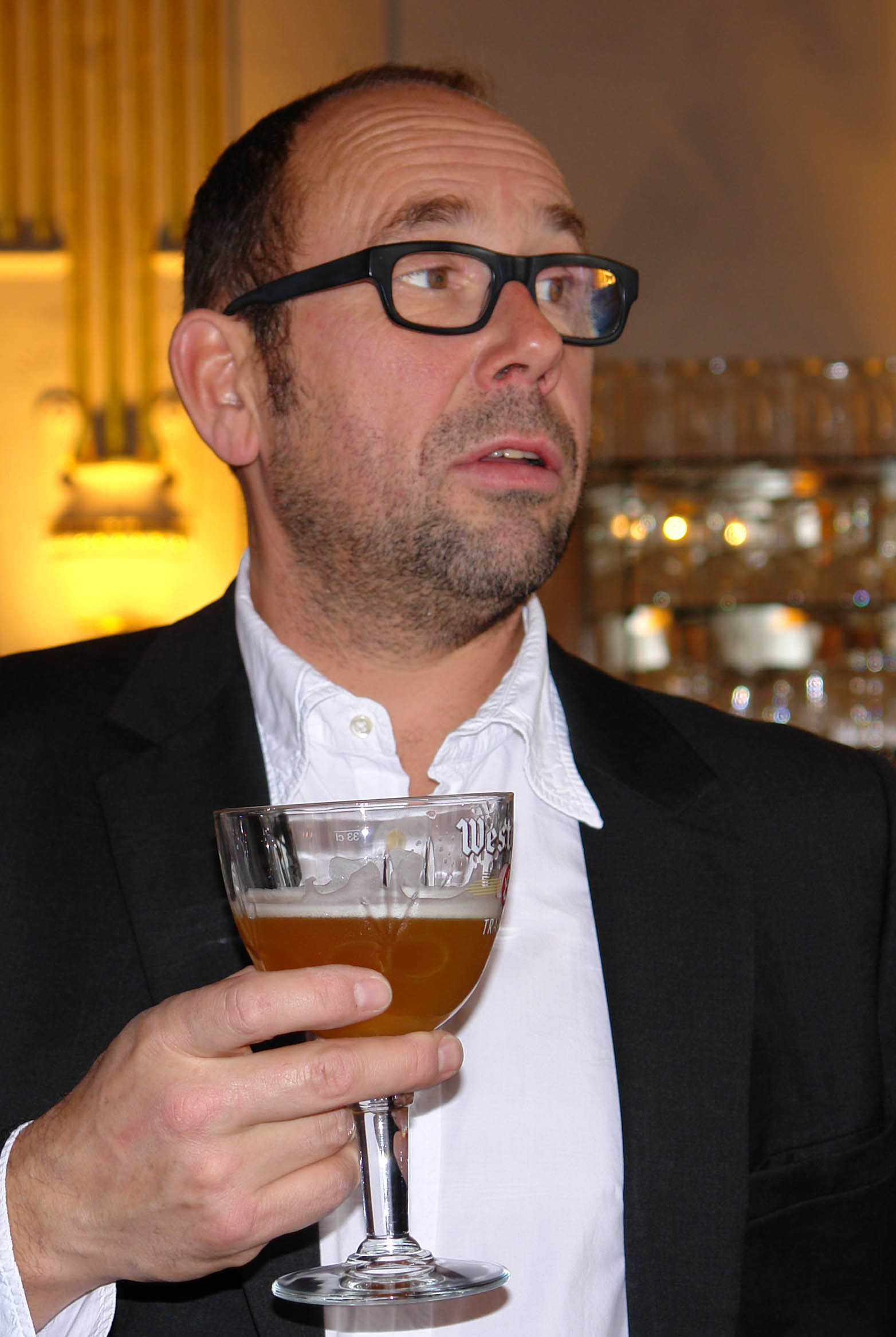 Olivier Gourmet au Festival international du film francophone de Namur en 2012, tenant un verre de la bière Westmalle.